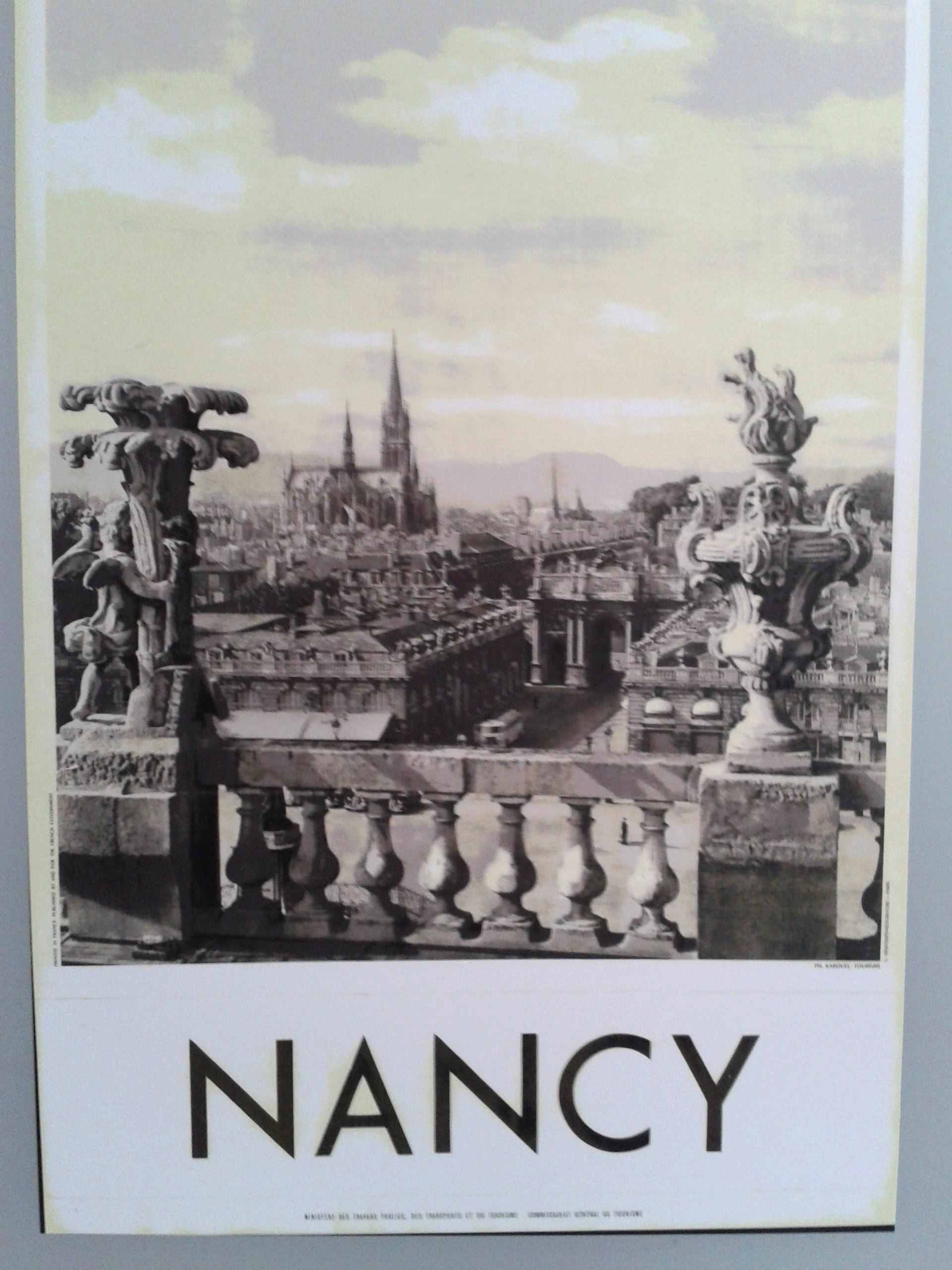 Vue prise en gare de Nancy dans l'espace "Work Station", reproduction de la collection de la SNCF